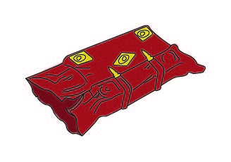 Oprawa płaszczowa. Rysunek.